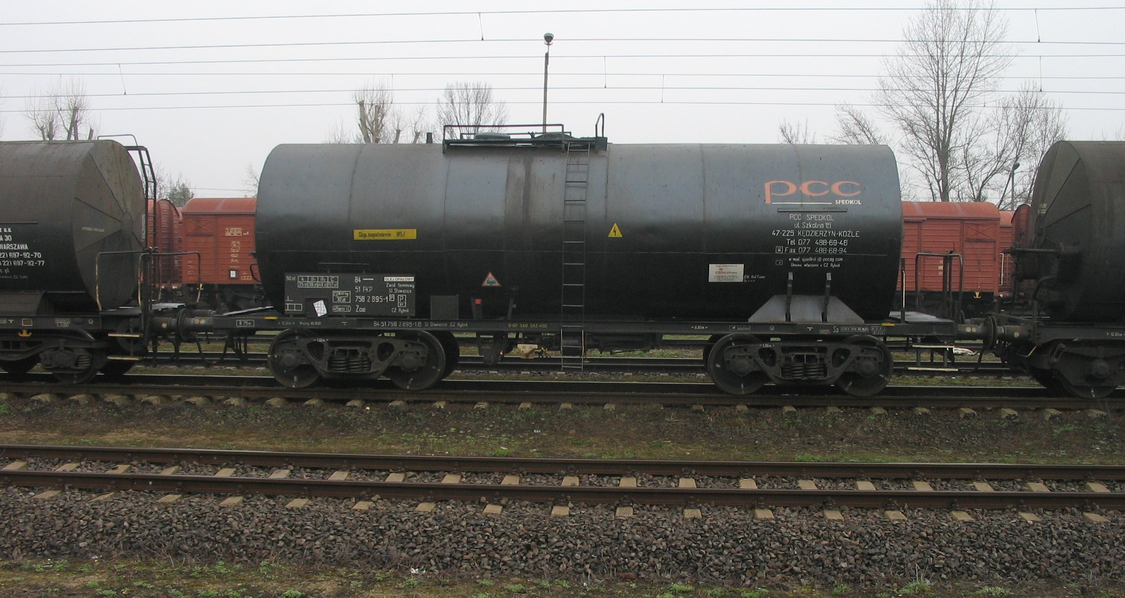 cysterna przewoźnika PCC na stacji Małkinia